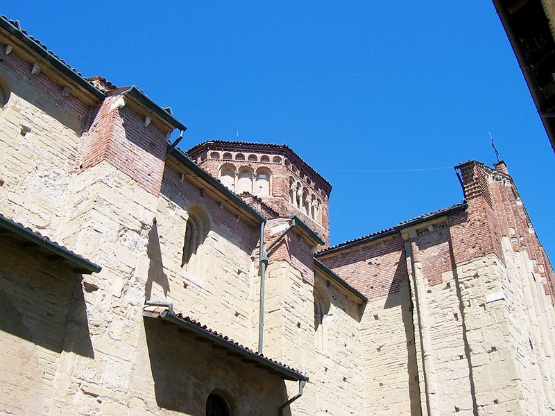 Pavia - Tiburio della Basilica di S. Michele